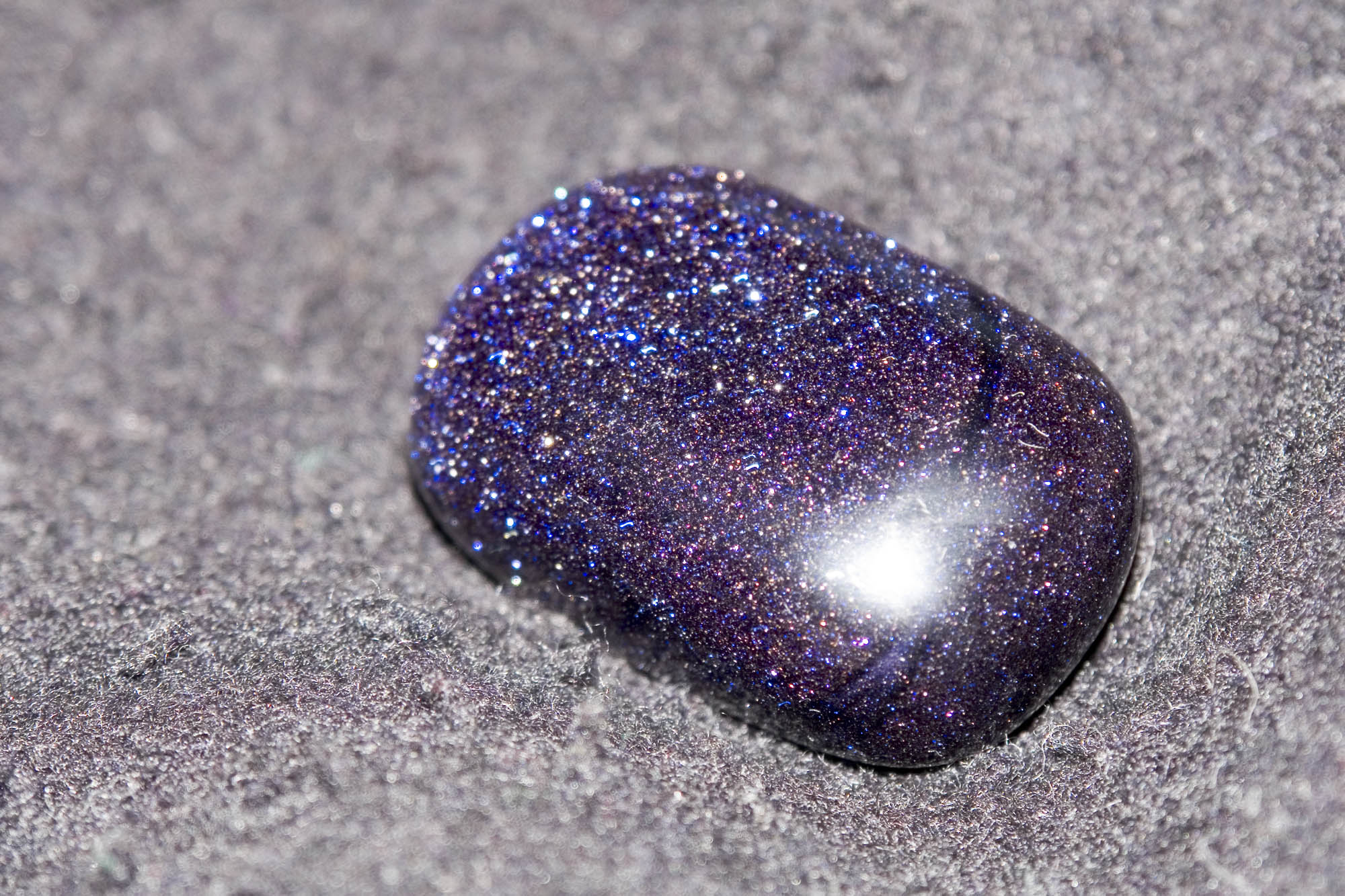 Blaufluss, Aventuringlas